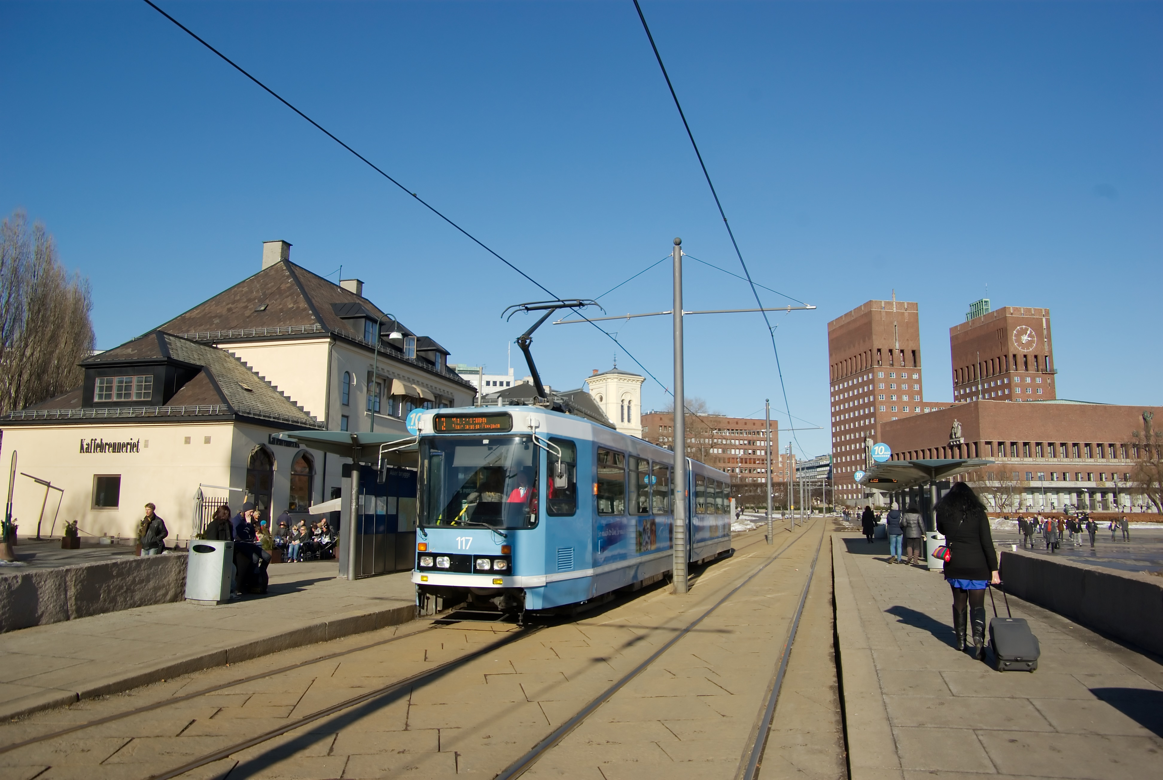 Trikkestopp rådhusbrygga